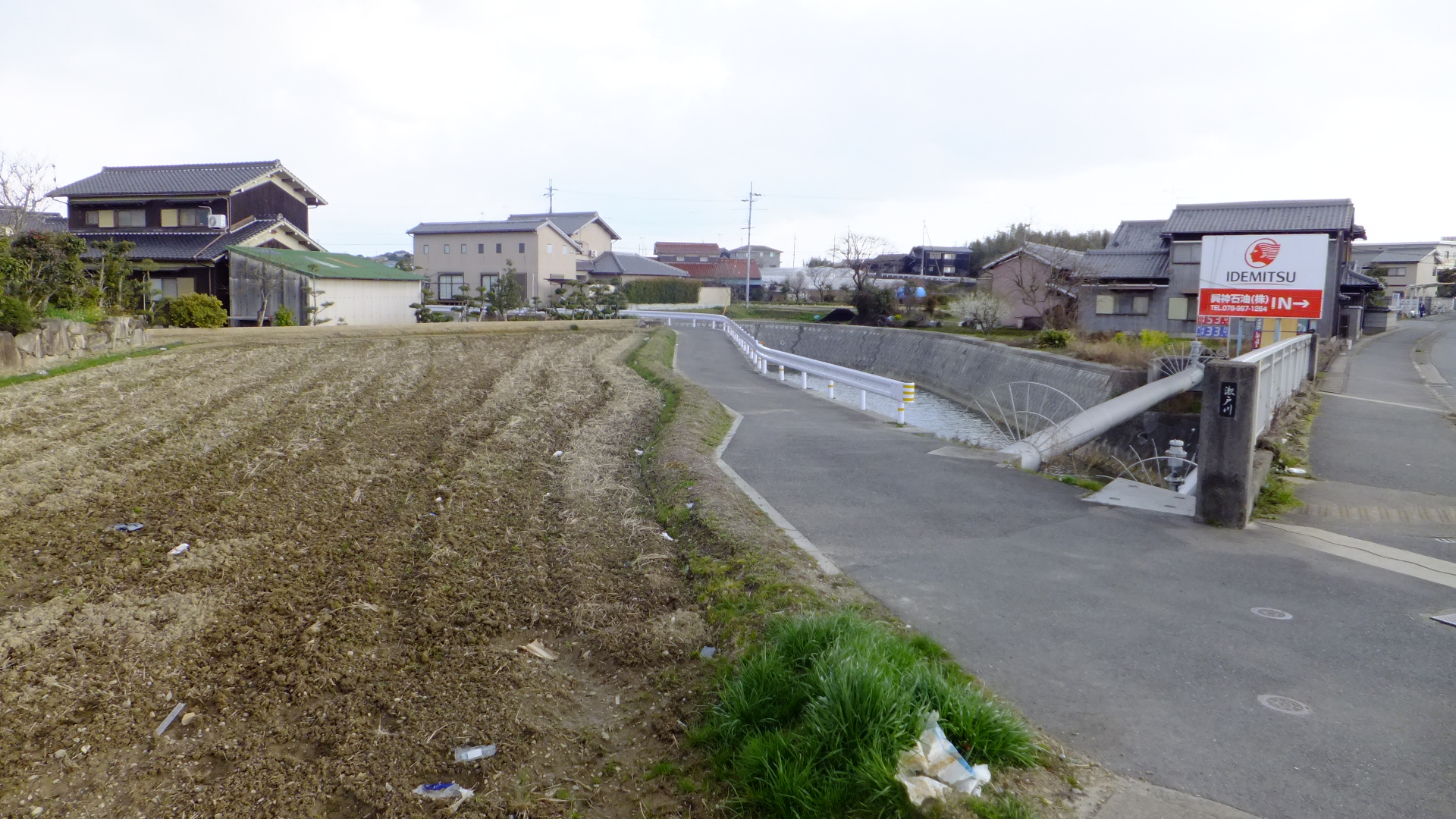 兵庫県神戸市岩岡町岩岡